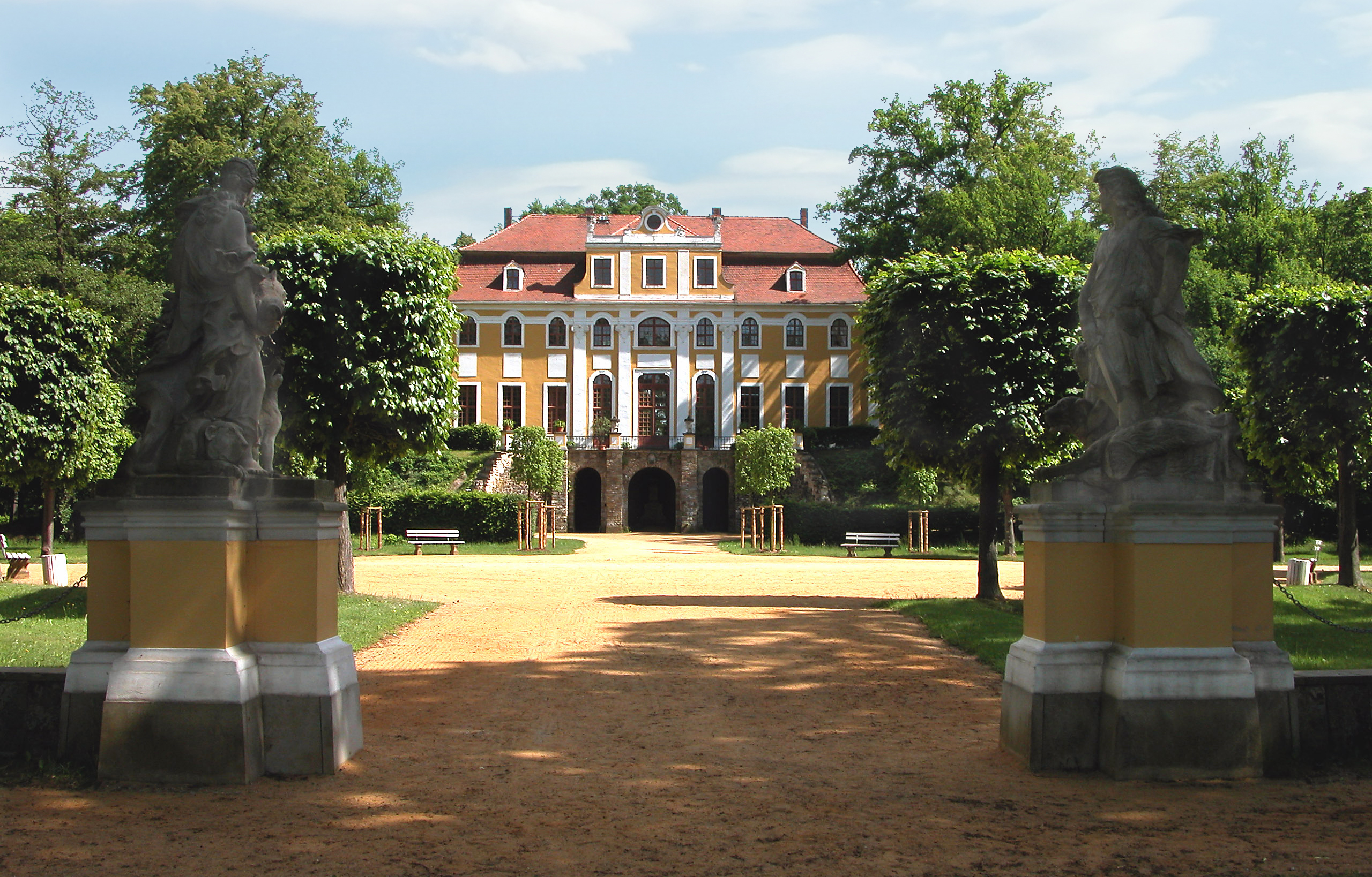 24.05.2003 02699 Neschwitz: Barockes Jagdschloß, 1730 anstelle einer alten Wasserburg errichtet. Barockgarten 1723 vermutlich von J. F. Karcher angelegt. Sicht von Westen. [DSCN]20030524520DR.JPG(c)Blobelt Hornjoserbsce: Njeswačanski hród; napohlad ze zapada.